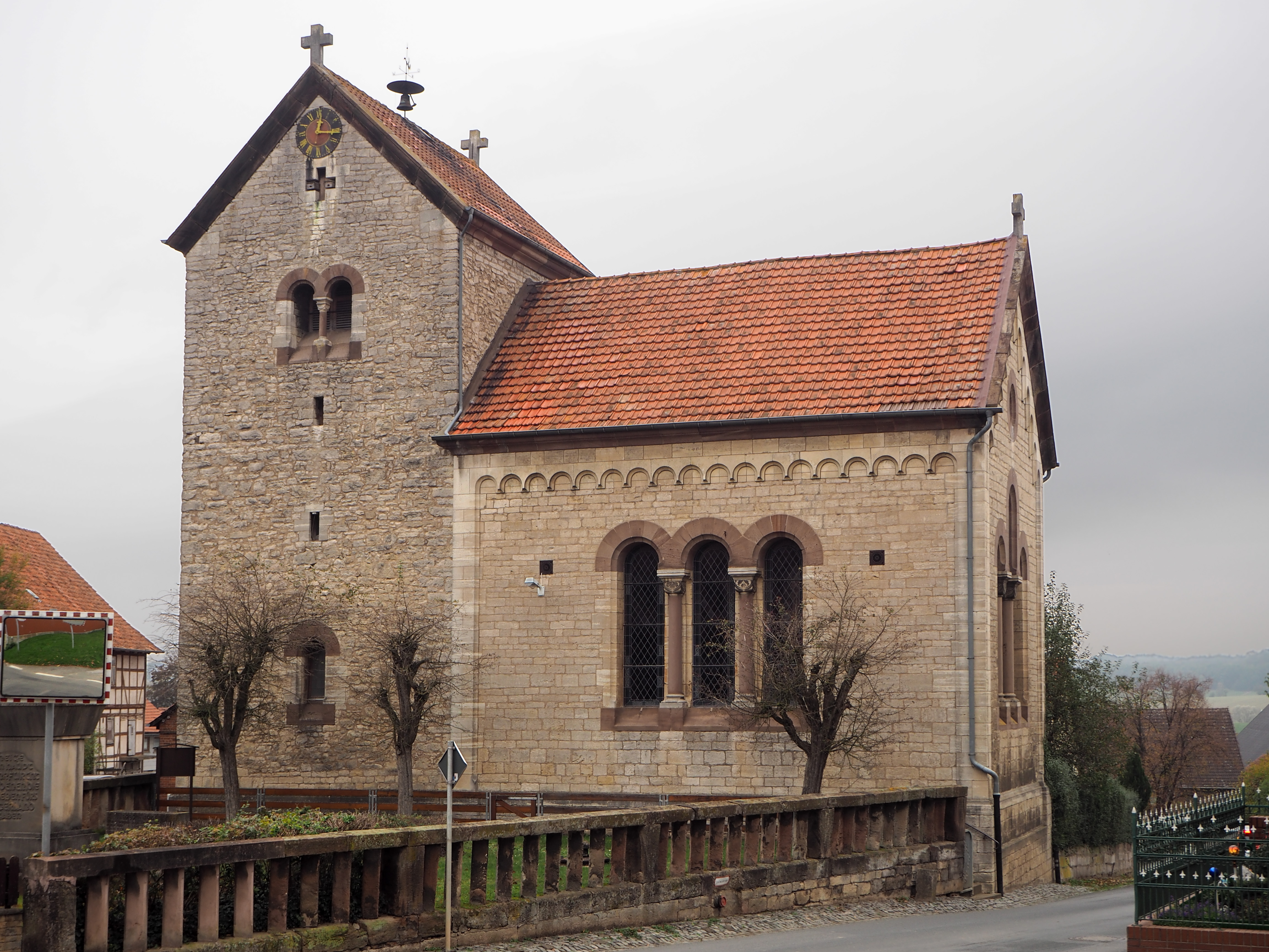 Dankelsheim – Johanniskirche – Foto 2019 Ein steinerner Bau ersetzte 1470 eine Holzkapelle. Die Kirche wurde mehrfach renoviert, darunter 1607 durch den ersten evangelischen Cluser Abt, Georg Schünemann, sowie 1875. Die heutige Erscheinungsform ist vom neuromanischen Stil geprägt.